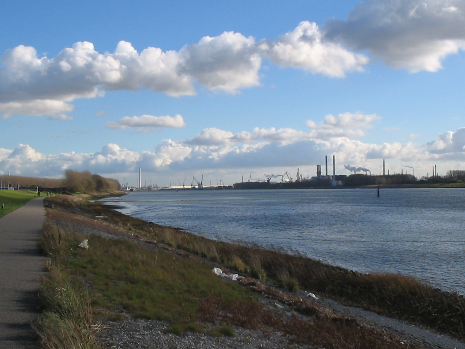 Nieuwe waterweg bij Maassluis, november 2005